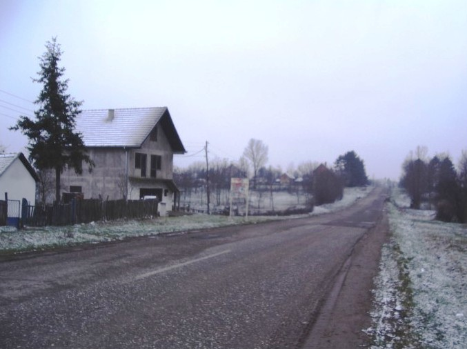 Лончаник.